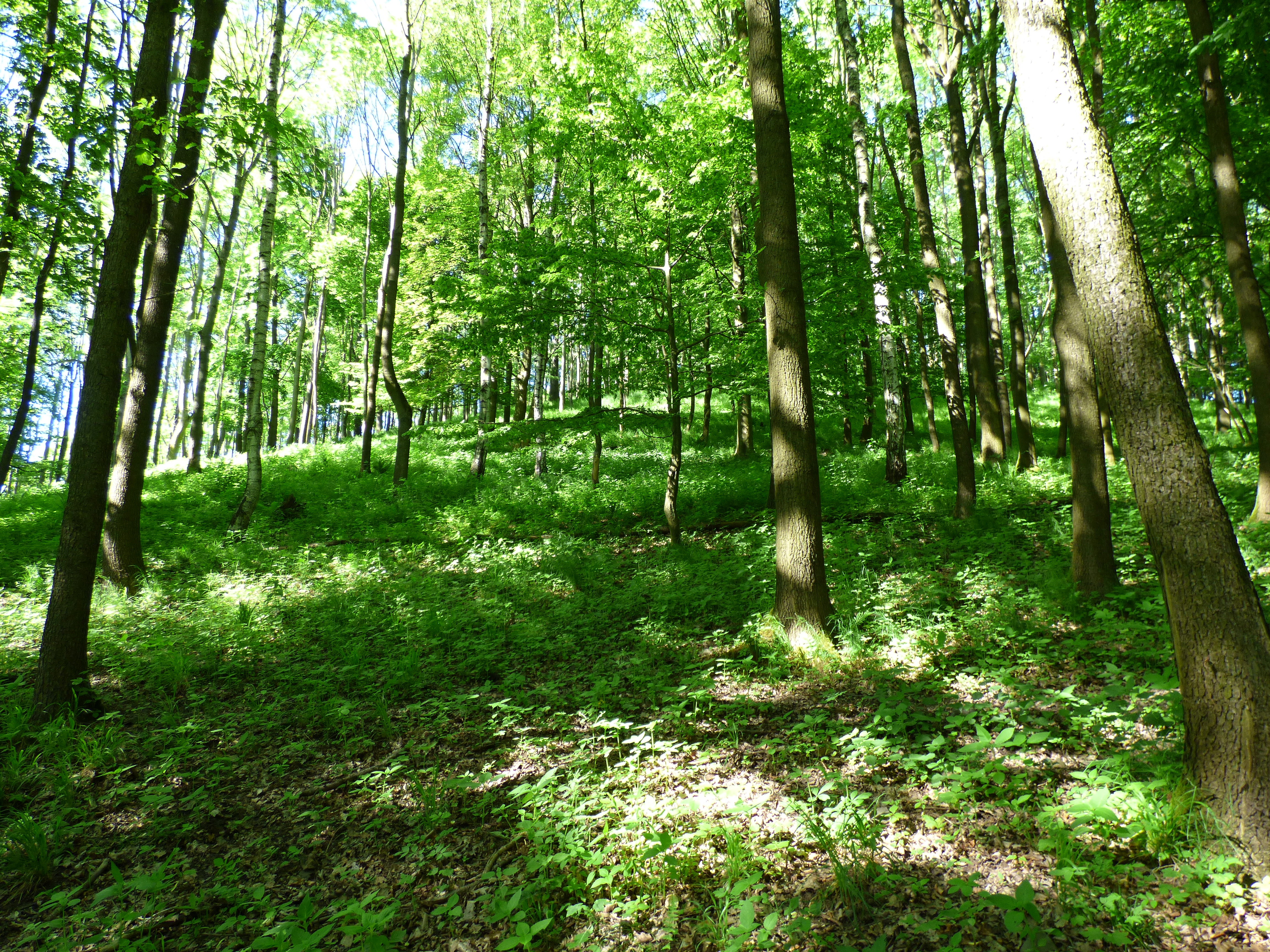 PR Maiberg